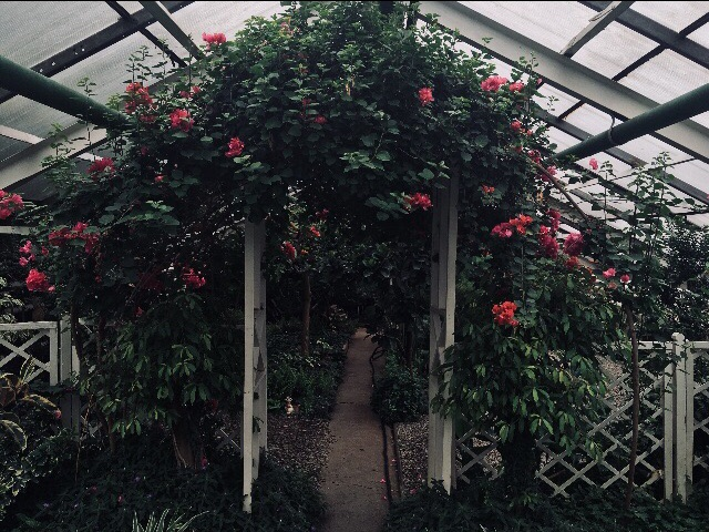 Экспозиция в Забайкальском ботаническом саду